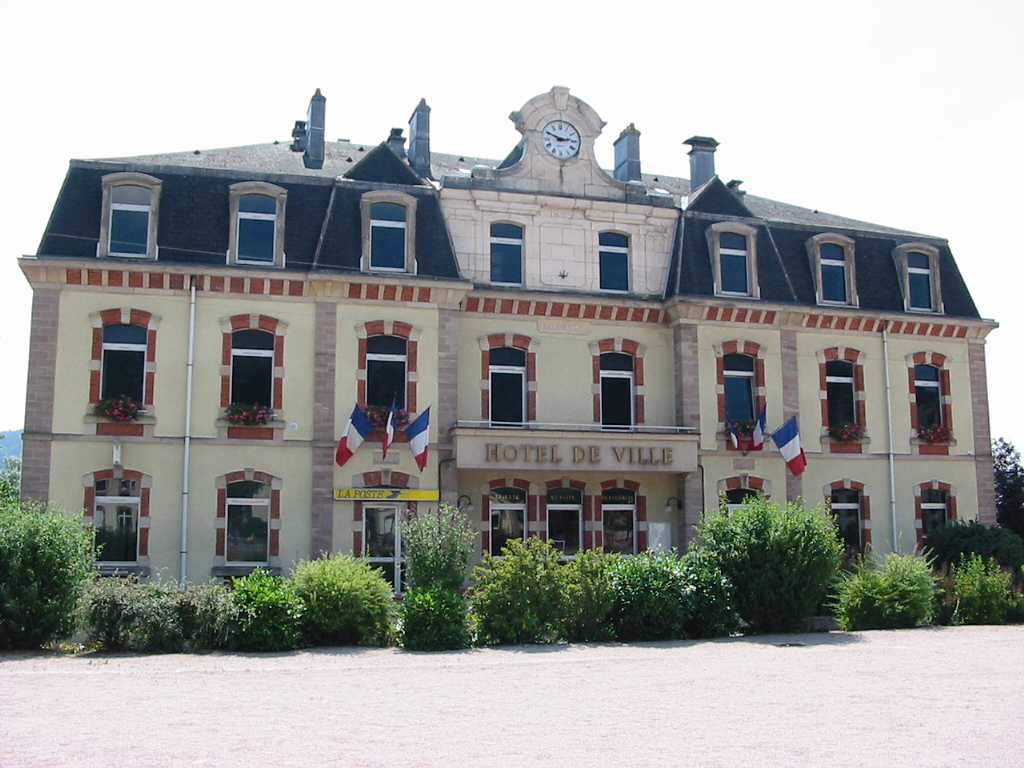 Saint-Étienne-lès-Remiremont La mairie occupant l'ancienne caserne Victor (1892) Commune du canton de Remiremont (Vosges) Photo personnelle du 15 juillet 2006. Copyright © Christian Amet